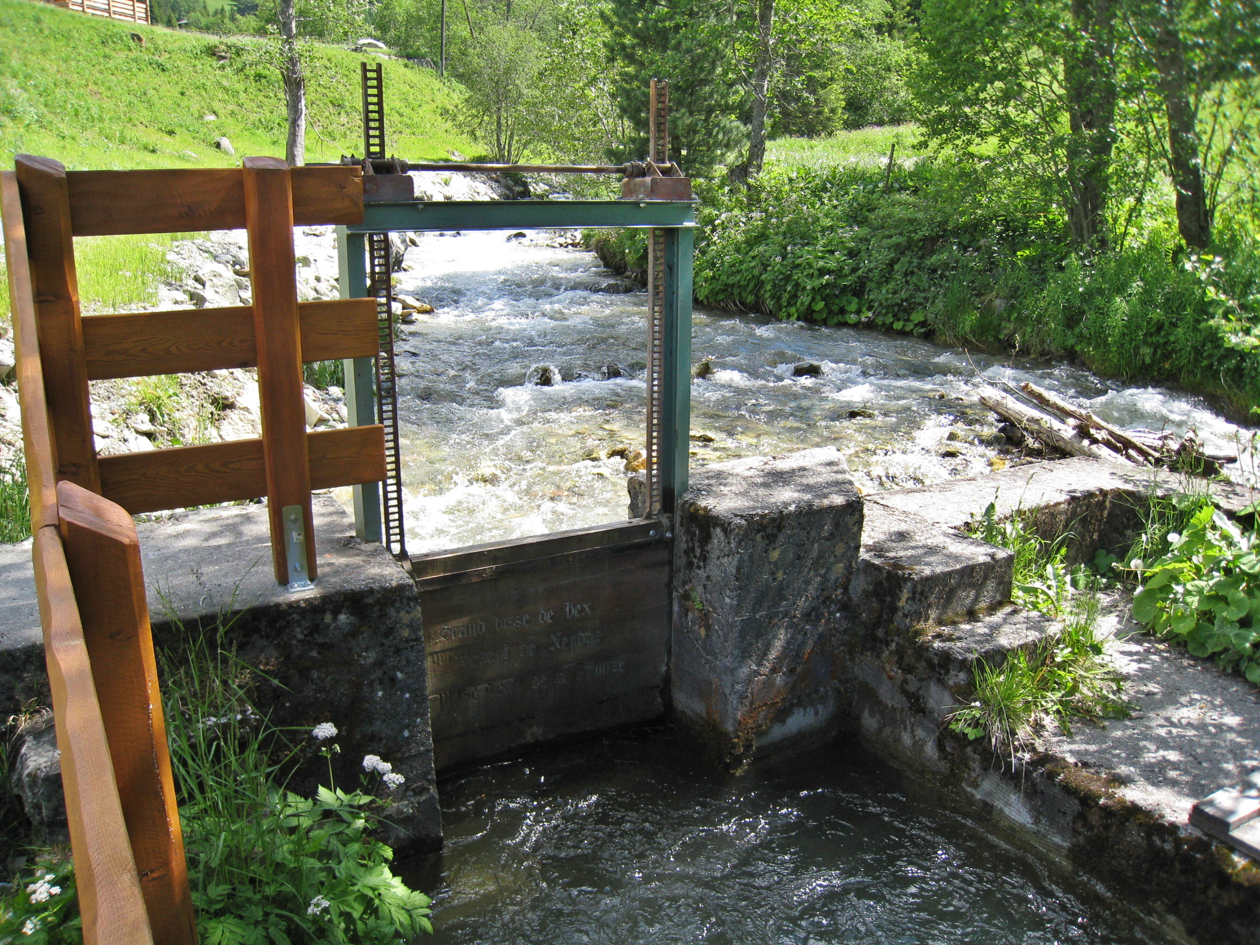 Prise d'eau du Grand Bisse de Vex sur la Printze. On peut lire sur le panneau en bois de l'écluse: "Grand Bisse de Vex, venant de Nendaz, prise d'eau de la Printze".